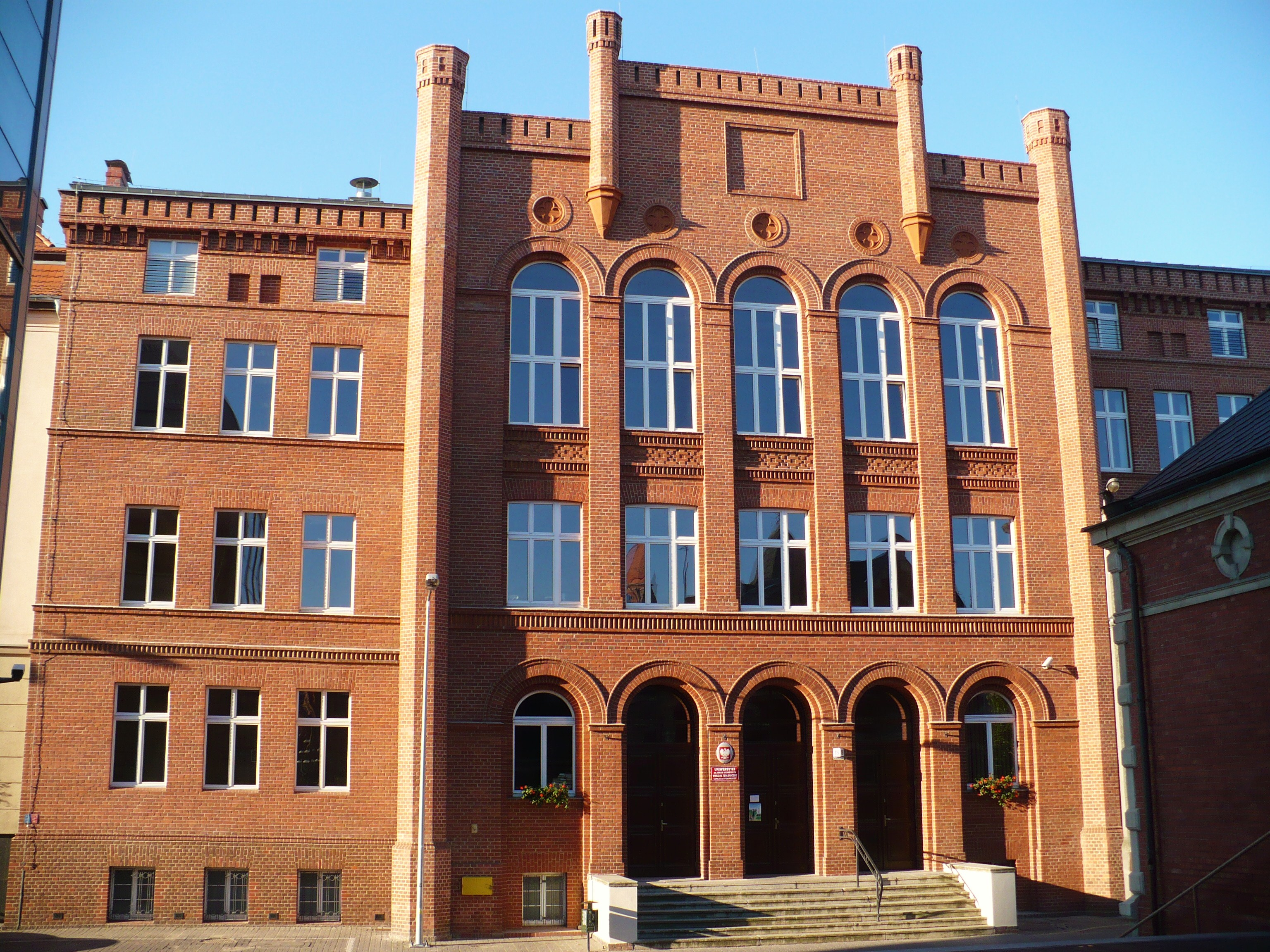 Bydgoszcz, Gimnazjum Realne, ob. ATR, 1858, 1908